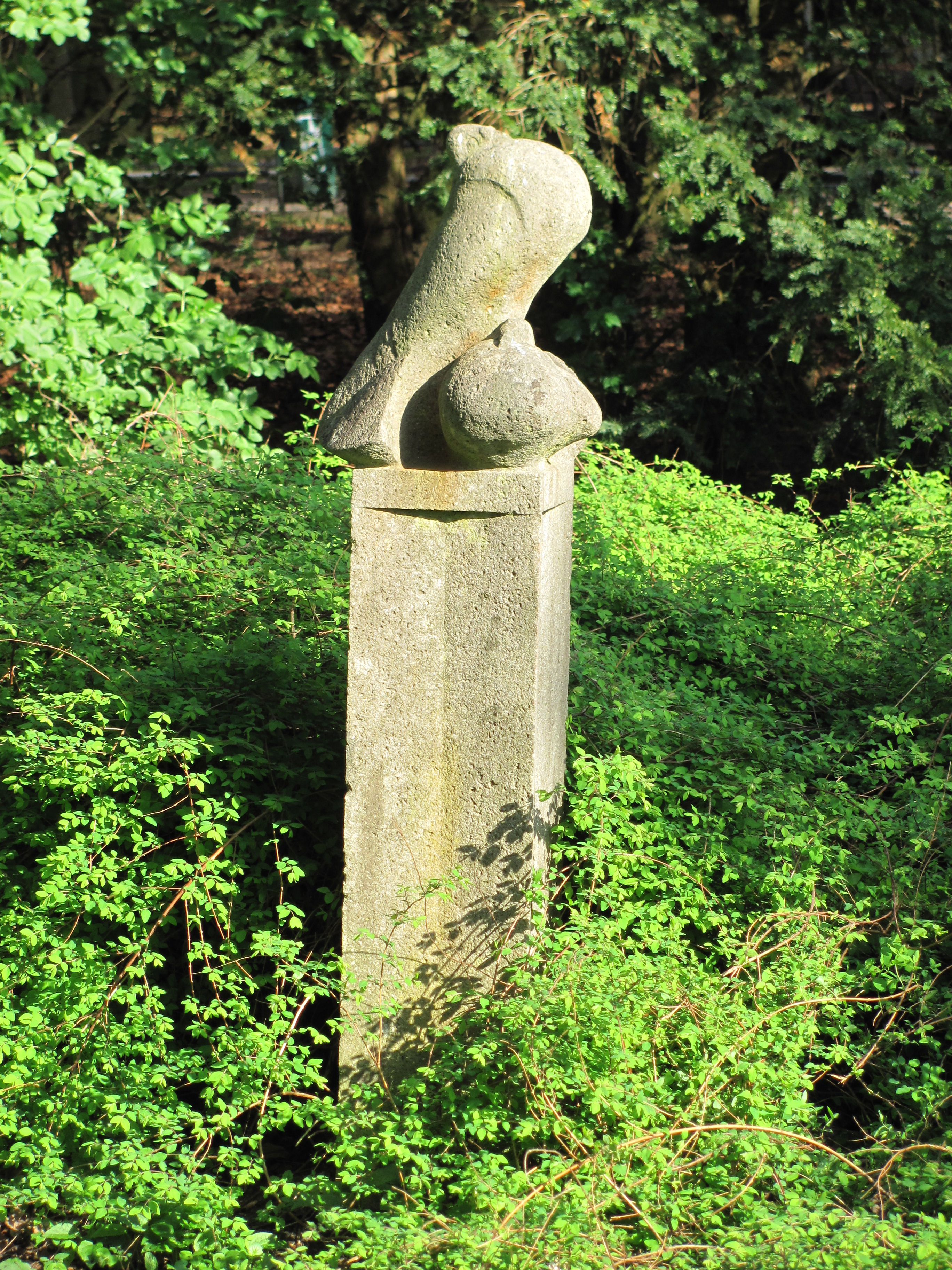 „Tauben“ von Martin Irwahn im Hamburger Stadtpark